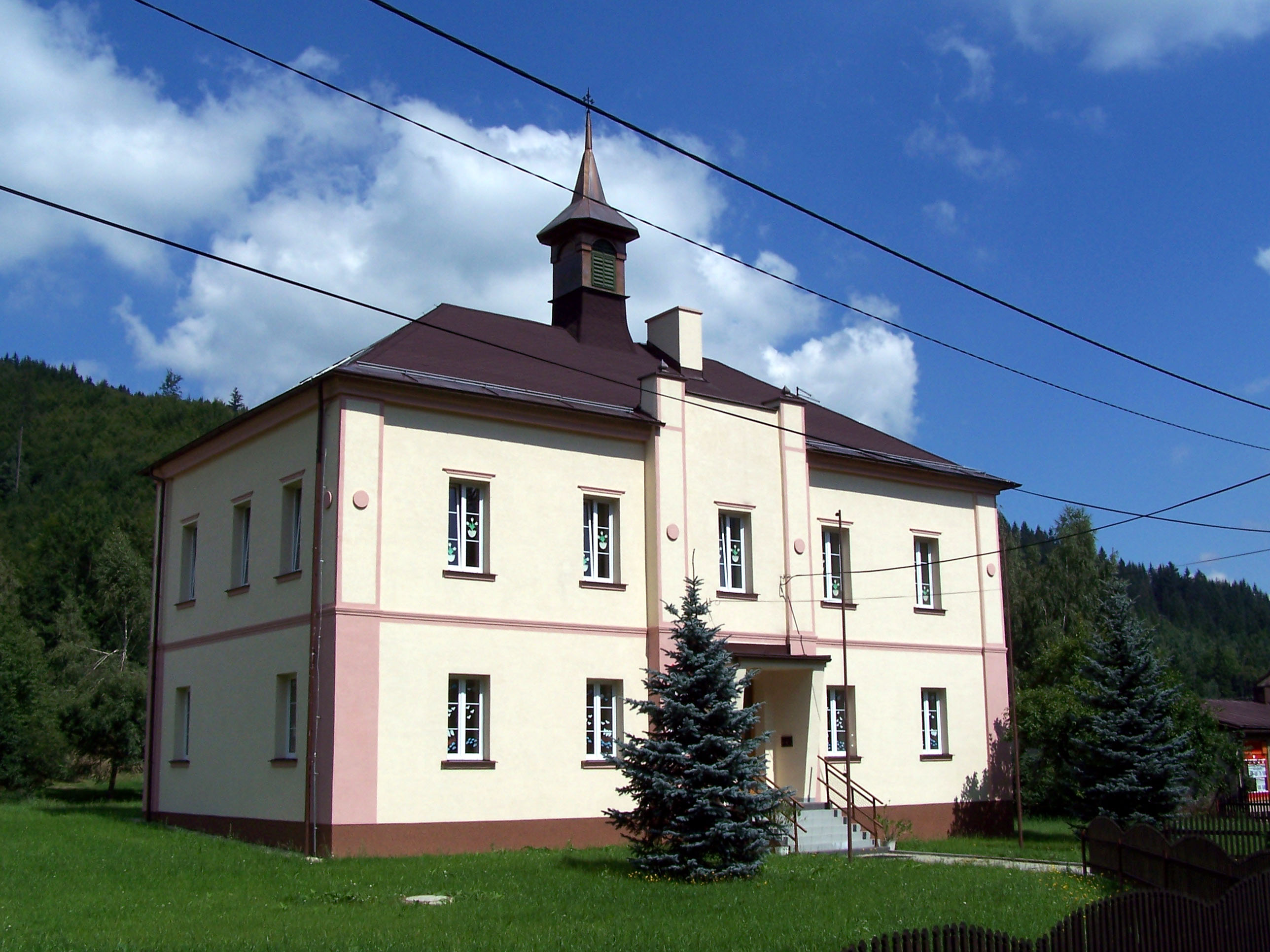 Polish elementary school in Dolní Lomná (Łomna Dolna), Czech Republic